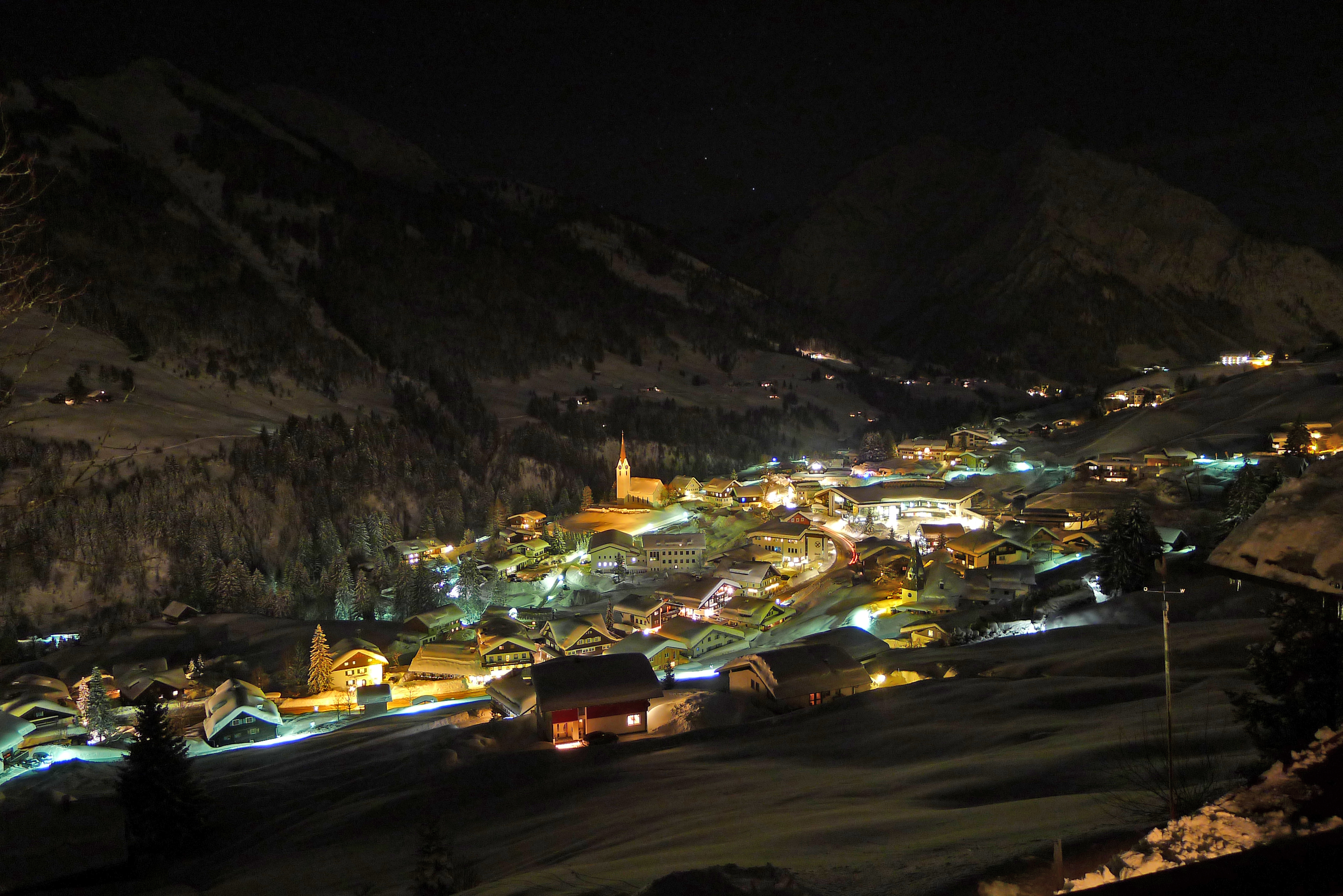 Hirschegg (Kleinwalsertal) bei Nacht - Blick zur Kirche und zum Walserhaus